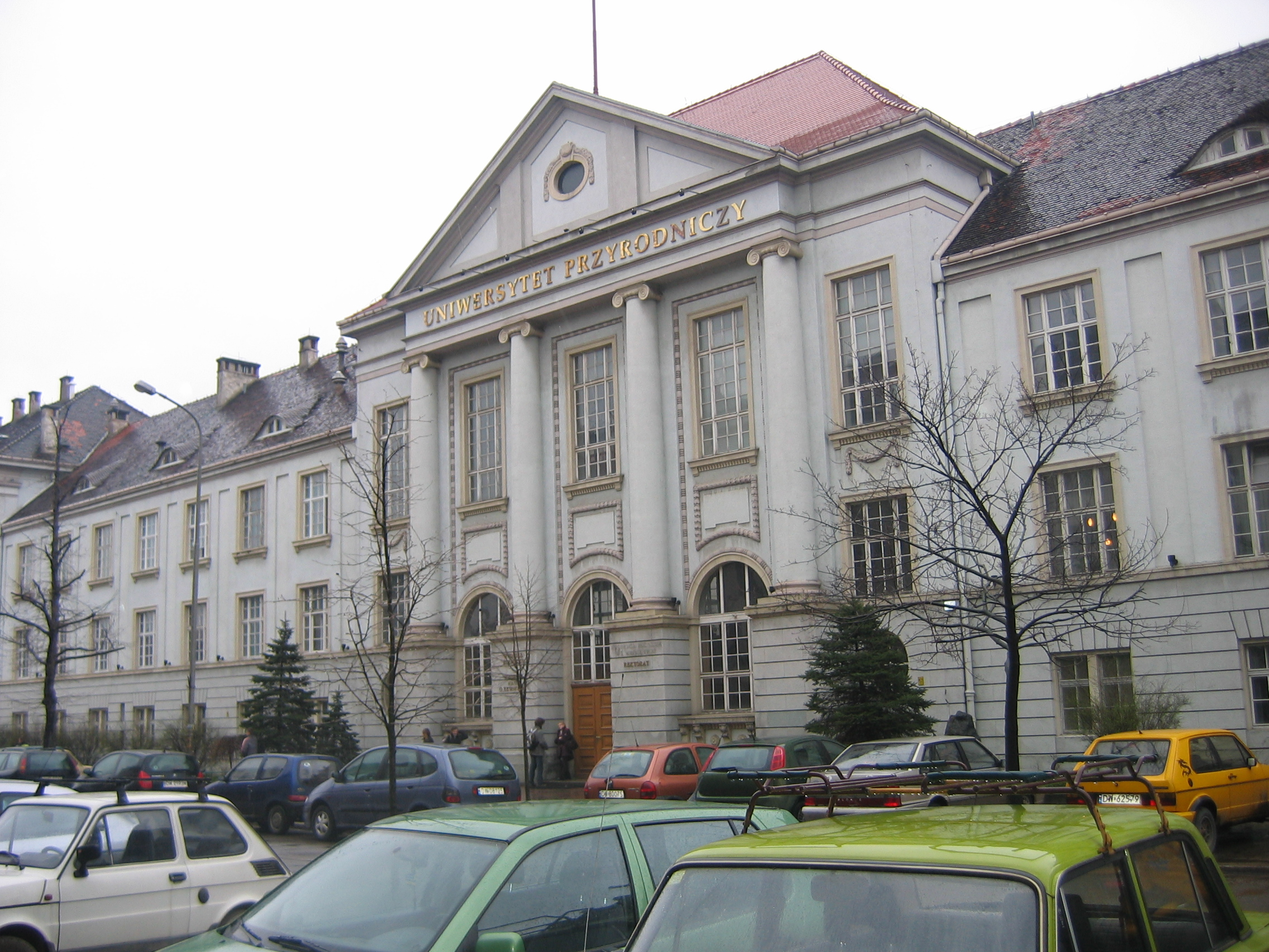 Uniwersytet Przyrodniczy we Wrocławiu, budynek rektoratu